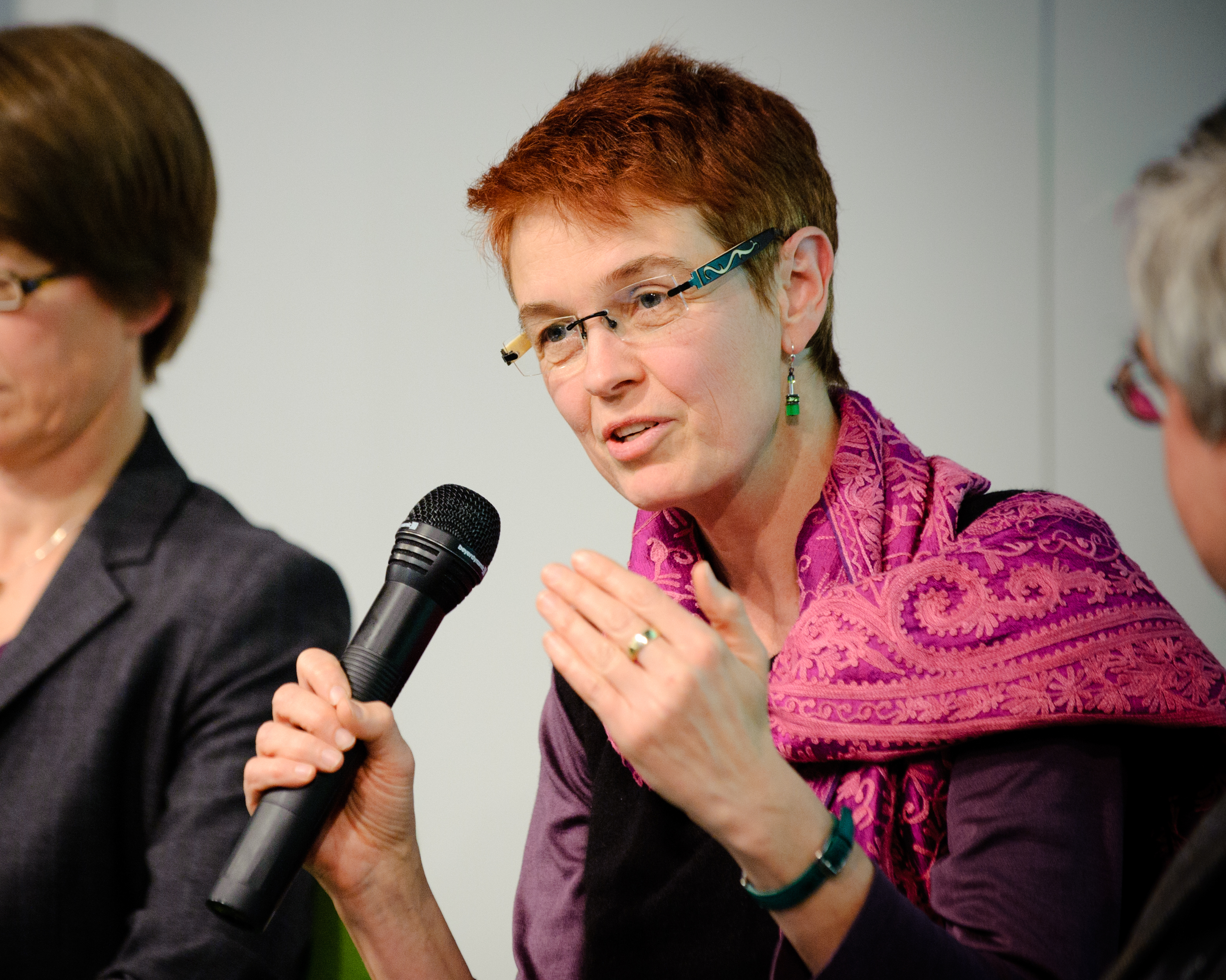 Bild: Stephan Röhl